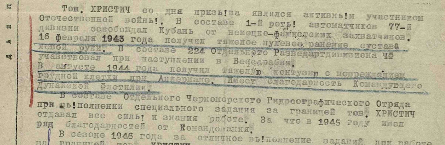 Документ о награждении Христич Н.Ф. Орден Красной Звезды, 15.11.1946 г.